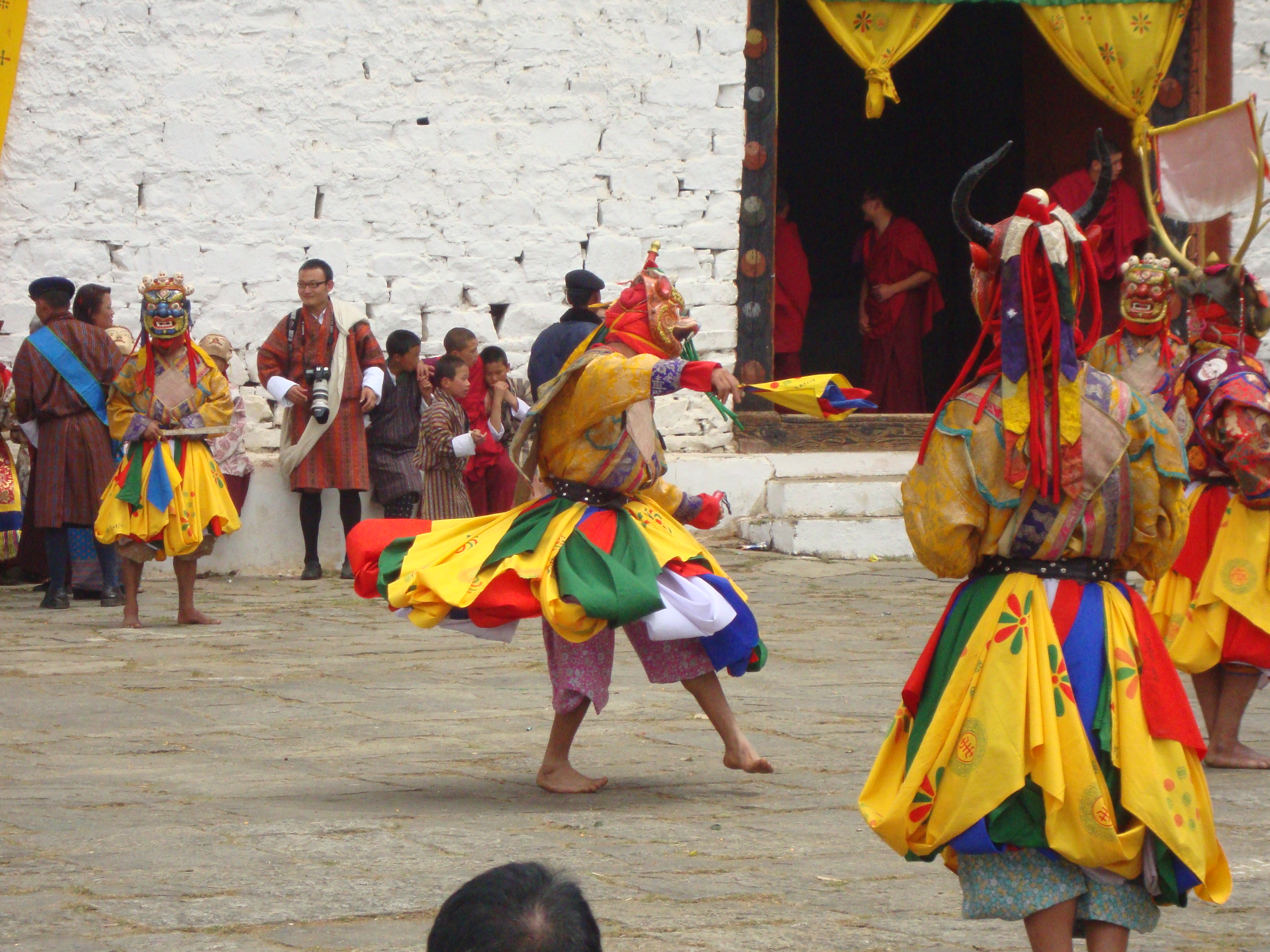 ഭൂട്ടാനിലെ പ്രശസ്ഥമായ പാറോ ത്സേചു എന്ന വസന്തകാല ഉത്സവത്തിലെ നർത്തകർ